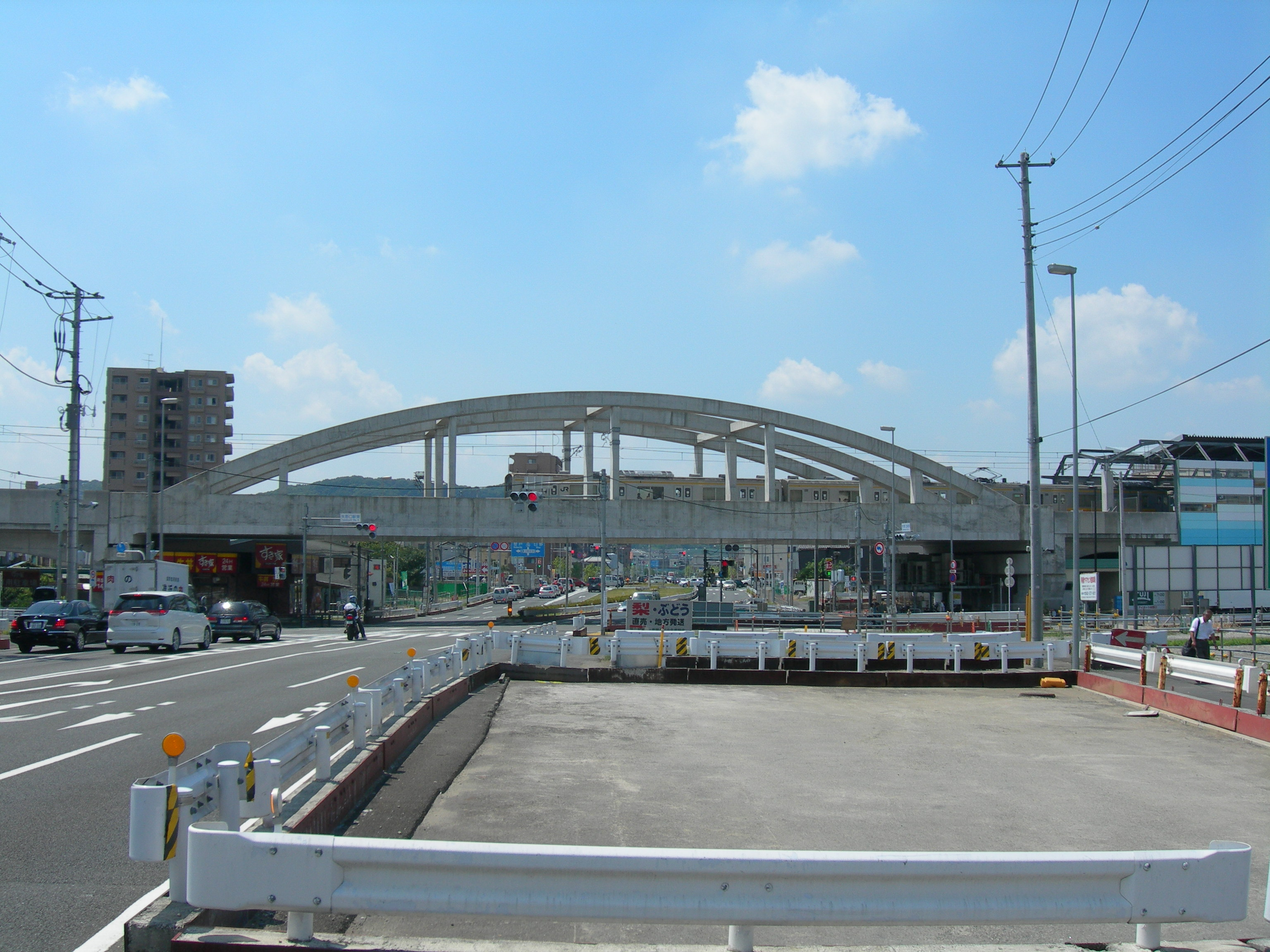 矢野口駅東側の南武線と東京都道・神奈川県道19号町田調布線の交差地点